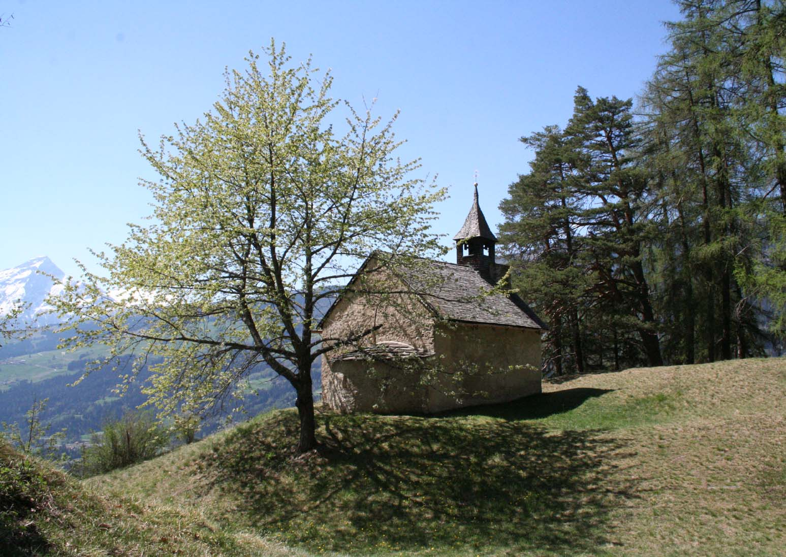 Kirche Maria Magdalena bei Paspels